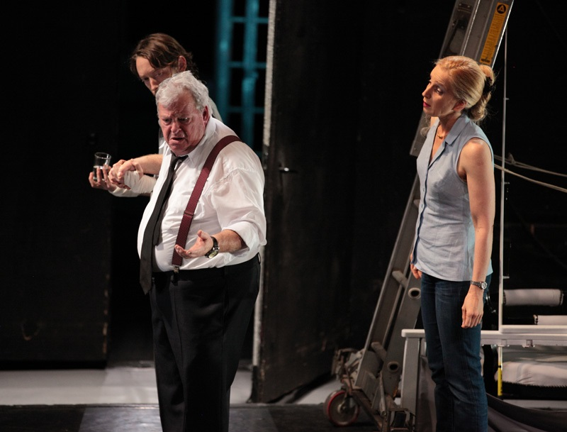 שירי גולן עם אבי אוריה ובני אלדר - השחף, 2013, צילום ירון אבולעפיה